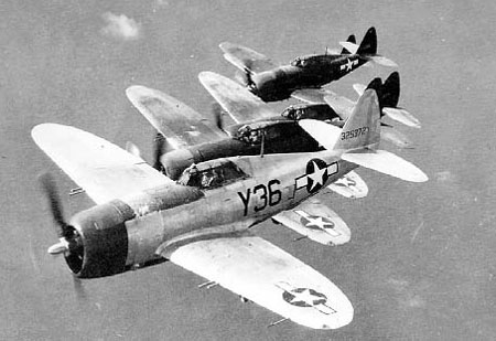 Republic P-47D